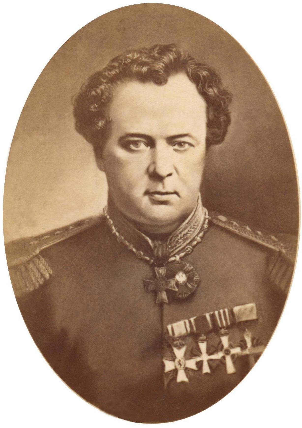 Geerlof Wassink